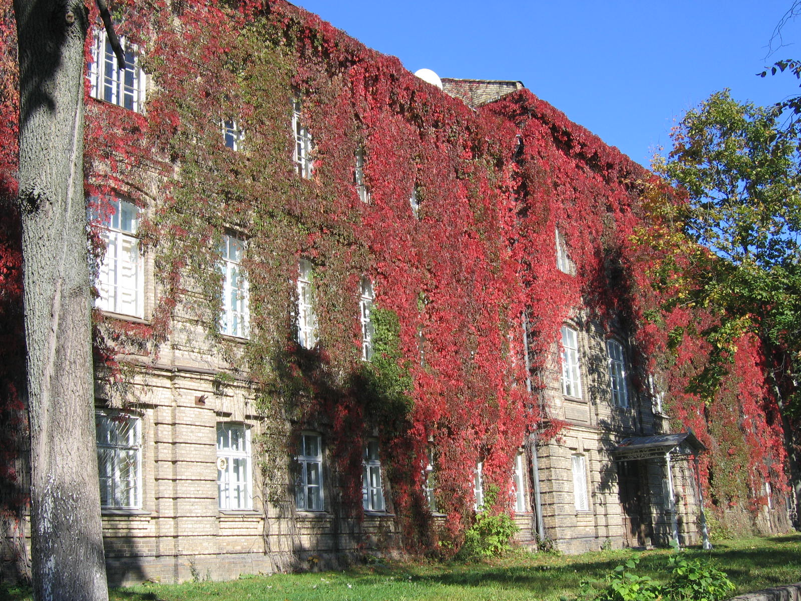 Старый корпус ГрГУ им. Янки Купалы